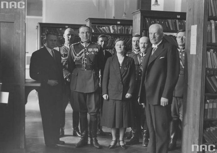 Wizyta prezydenta Ignacego Mościckiego w Centralnej Bibliotece Wojskowej w Warszawie. Na zdjęciu: Bronisław Hełczyński (1. z lewej), płk Jan Głogowski (na prawo za B. Hełczyńskim), dyrektor ppłk Marian Łodyński, dr A. Lewak, por. Władysław Krotkiewski, prezydent Ignacy Mościcki